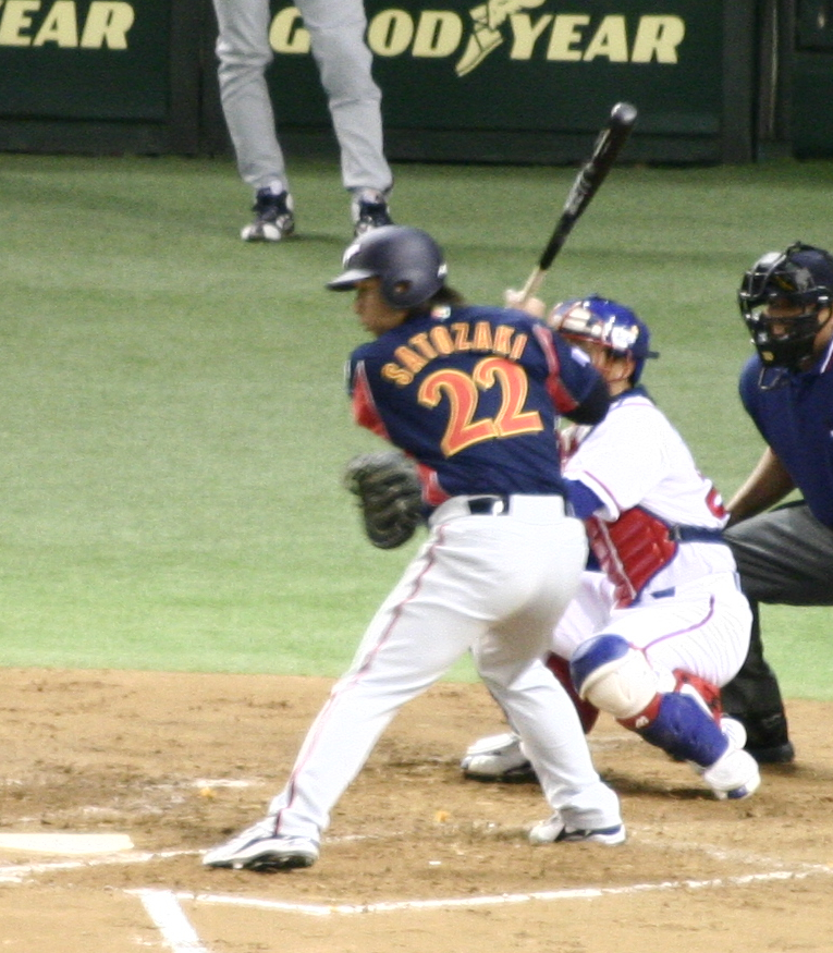 里崎智也